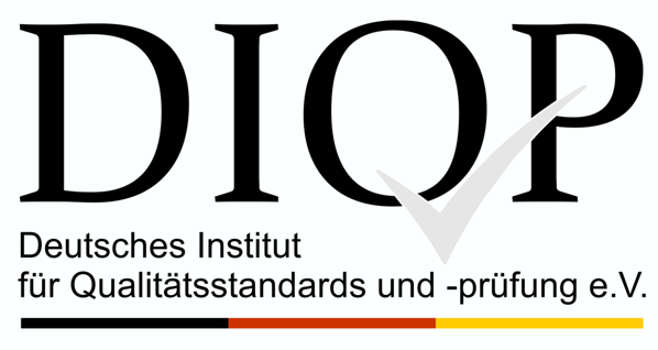 Logo DIQP Deutsches Institut für Qualitätsstandards und -prüfung e.V.